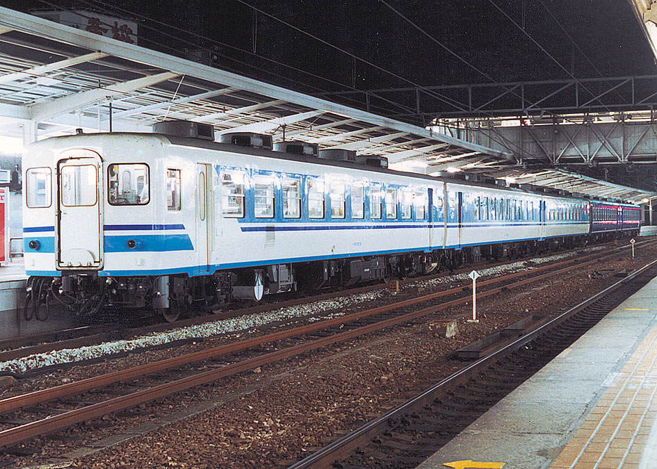 JR四国 12系座席車 ムーンライト高知用（初期色）